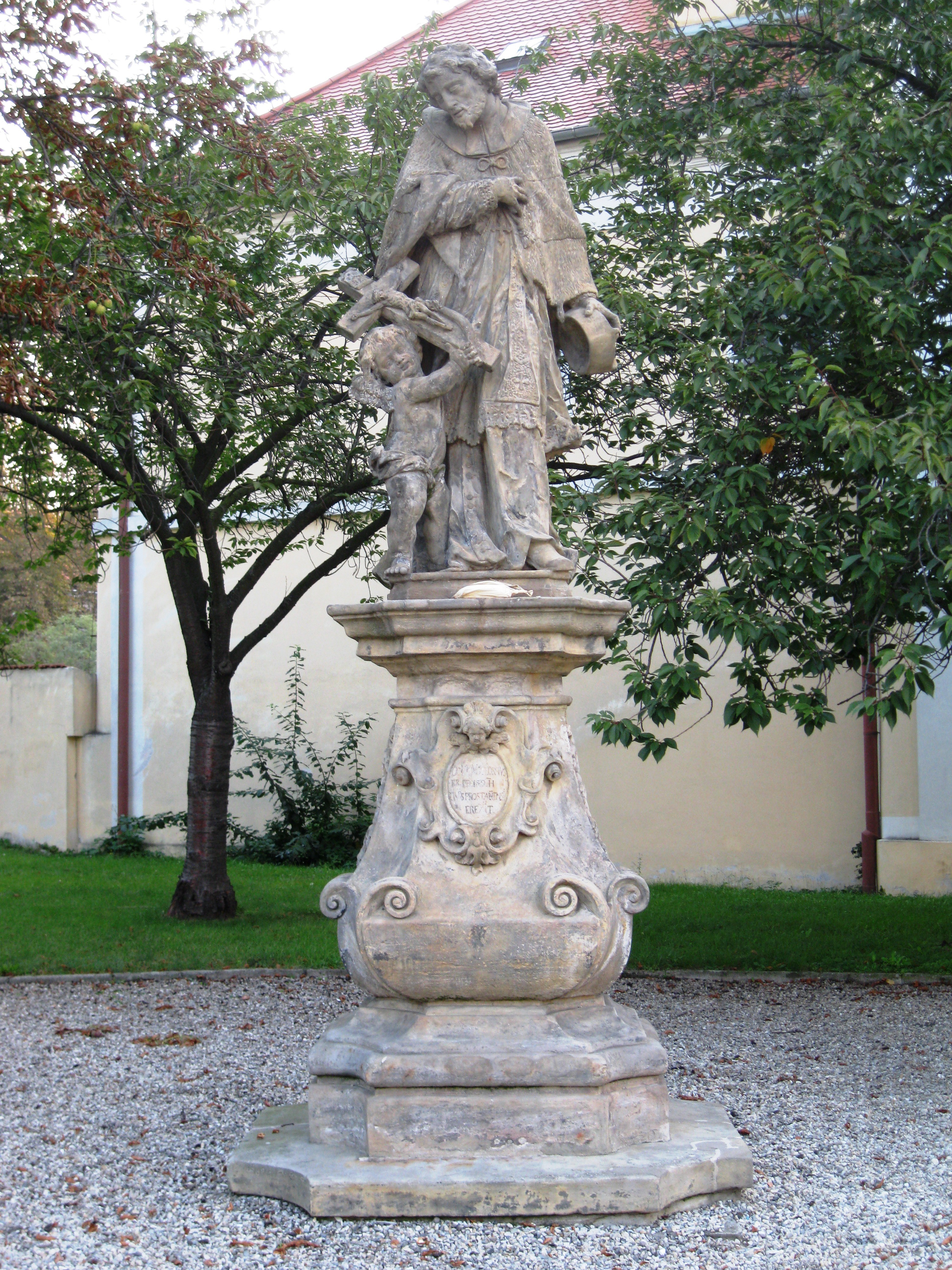 Socha sv. Jana Nepomuckého (Prostějov), v parku u kostela, Prostějov